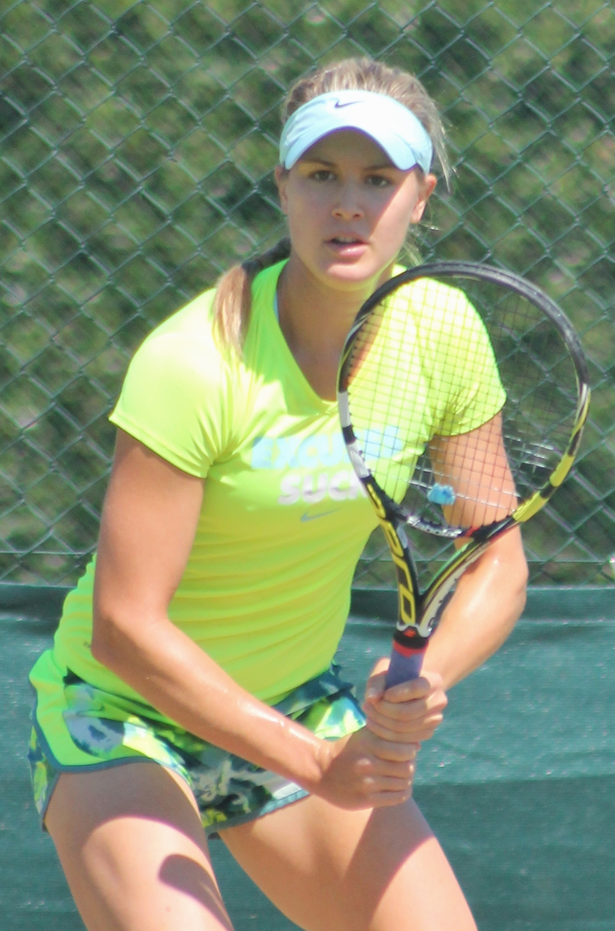 Bouchard WM14 (3)